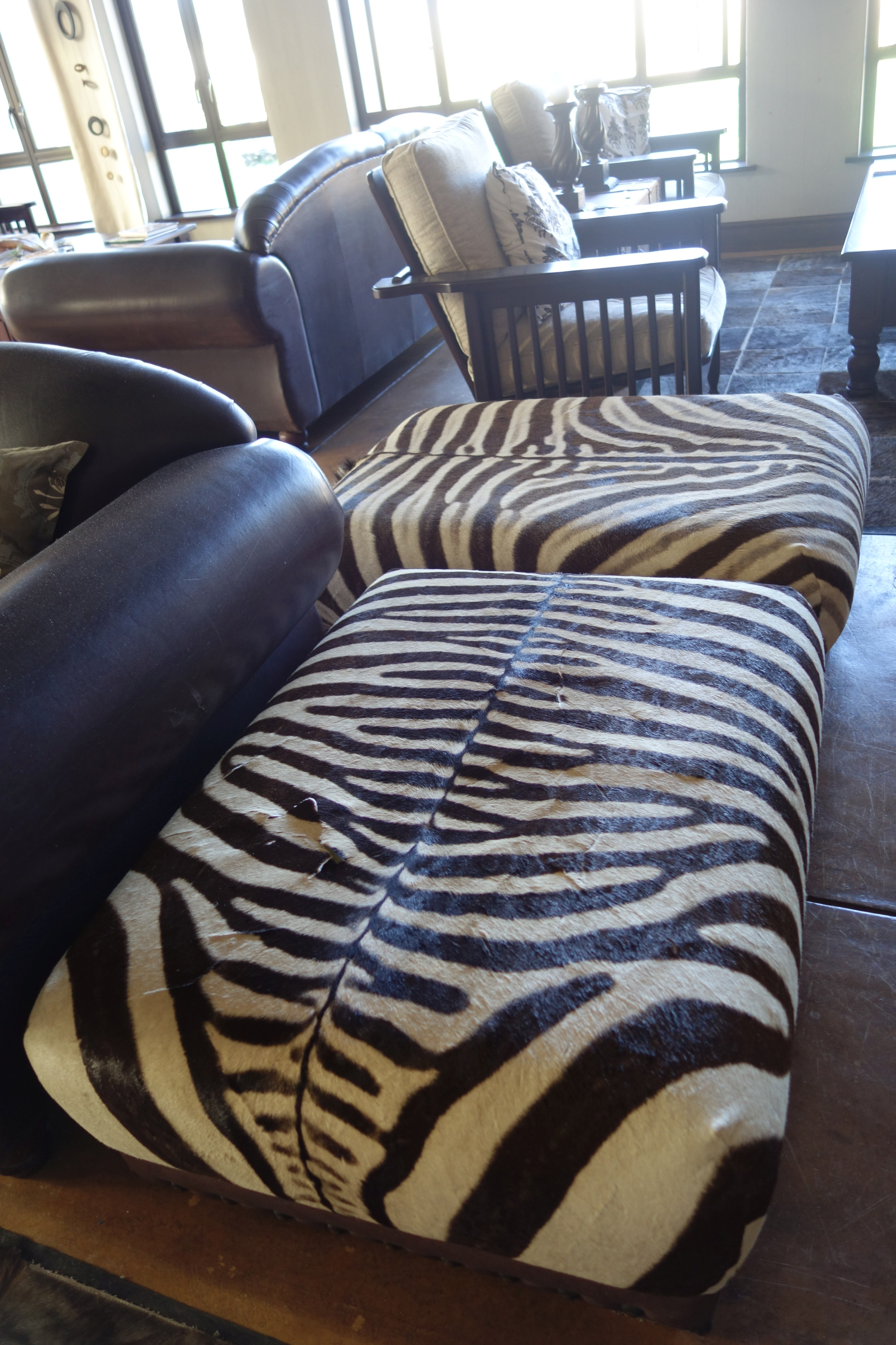 Namibia, Otjiwa Safari Lodge. Sitzmöbel mit Zebrafellbezug.